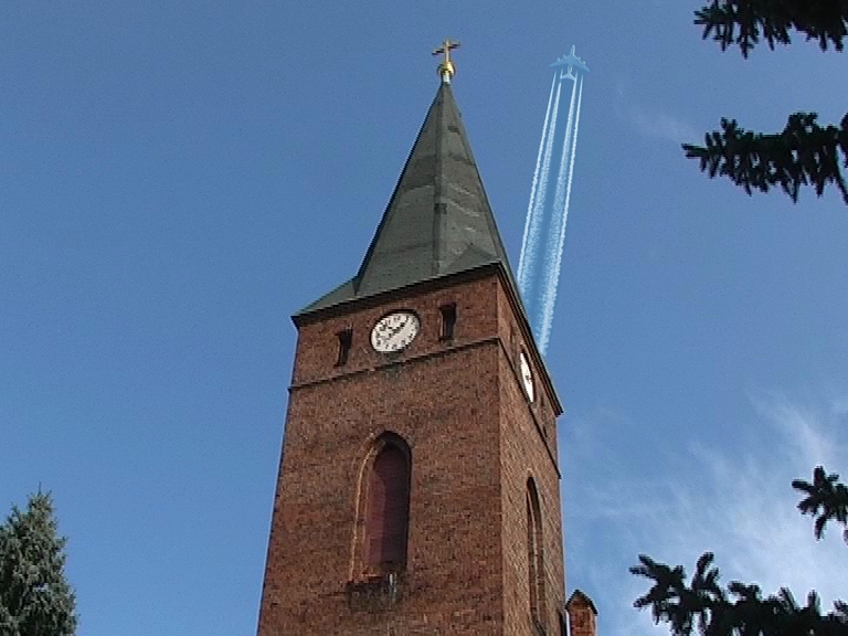 Kirchturm. Foto: Rainer Kamenz.